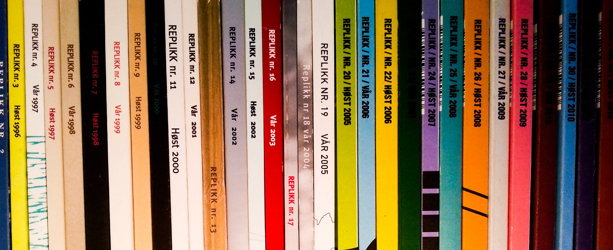 Ymse utgåver av Tidsskriftet Replikk.